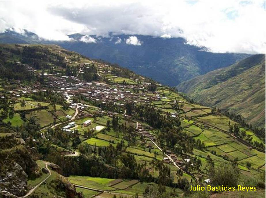 Punchao